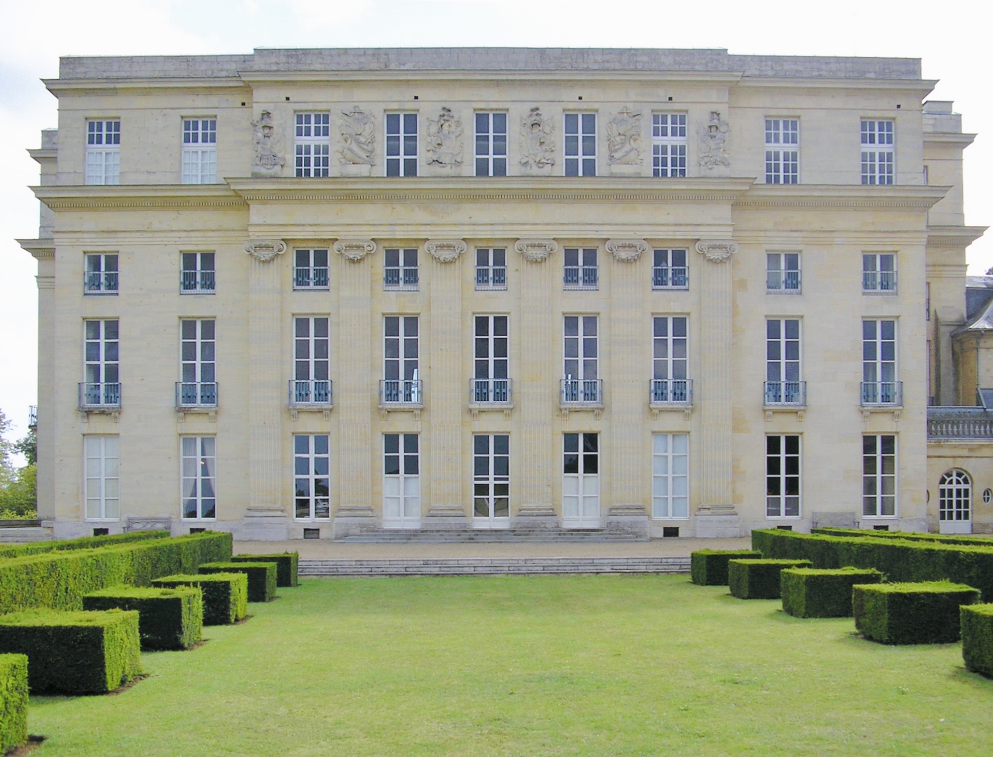 façade nord chateau de Benouville